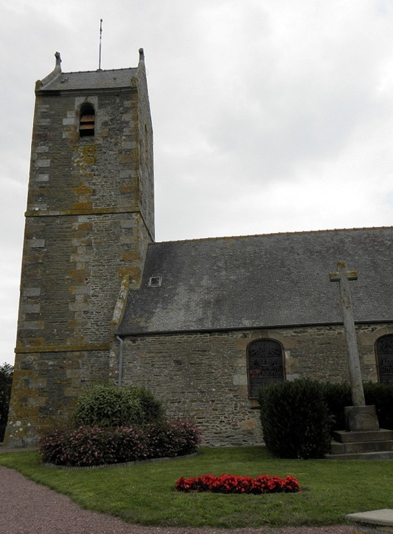 Église de Beauvoir (50).